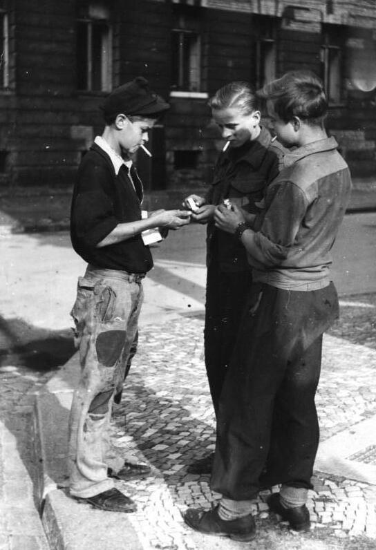 Schwarzmarkt, Jugendliche handeln mit Zigaretten Zentralbild-dpd Nachkriegsprobleme in Westdeutschland 1948. Jugendliche in einer westdeutschen Stadt, die auf dem "Schwarzen Markt" mit Zigaretten handeln. Eine geregelte Arbeit kennen sie nicht. 2017-48